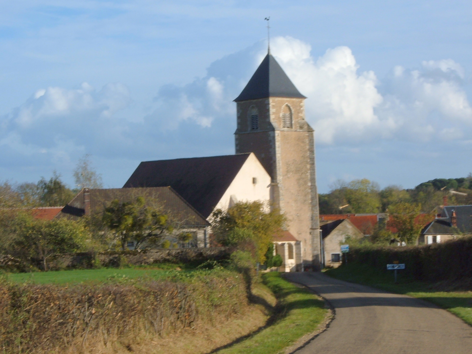 église St Symphorien de Provency